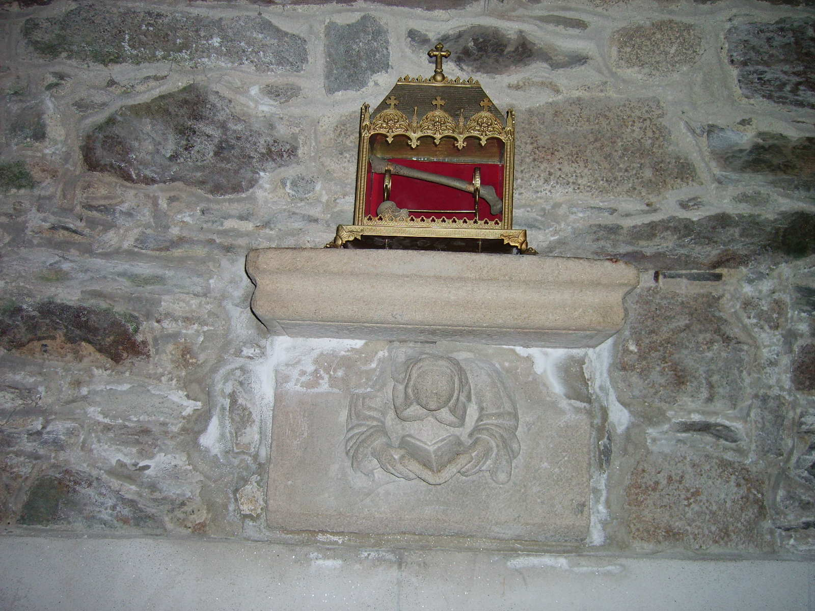 Relikvoj de sankta Magloire en Léhon